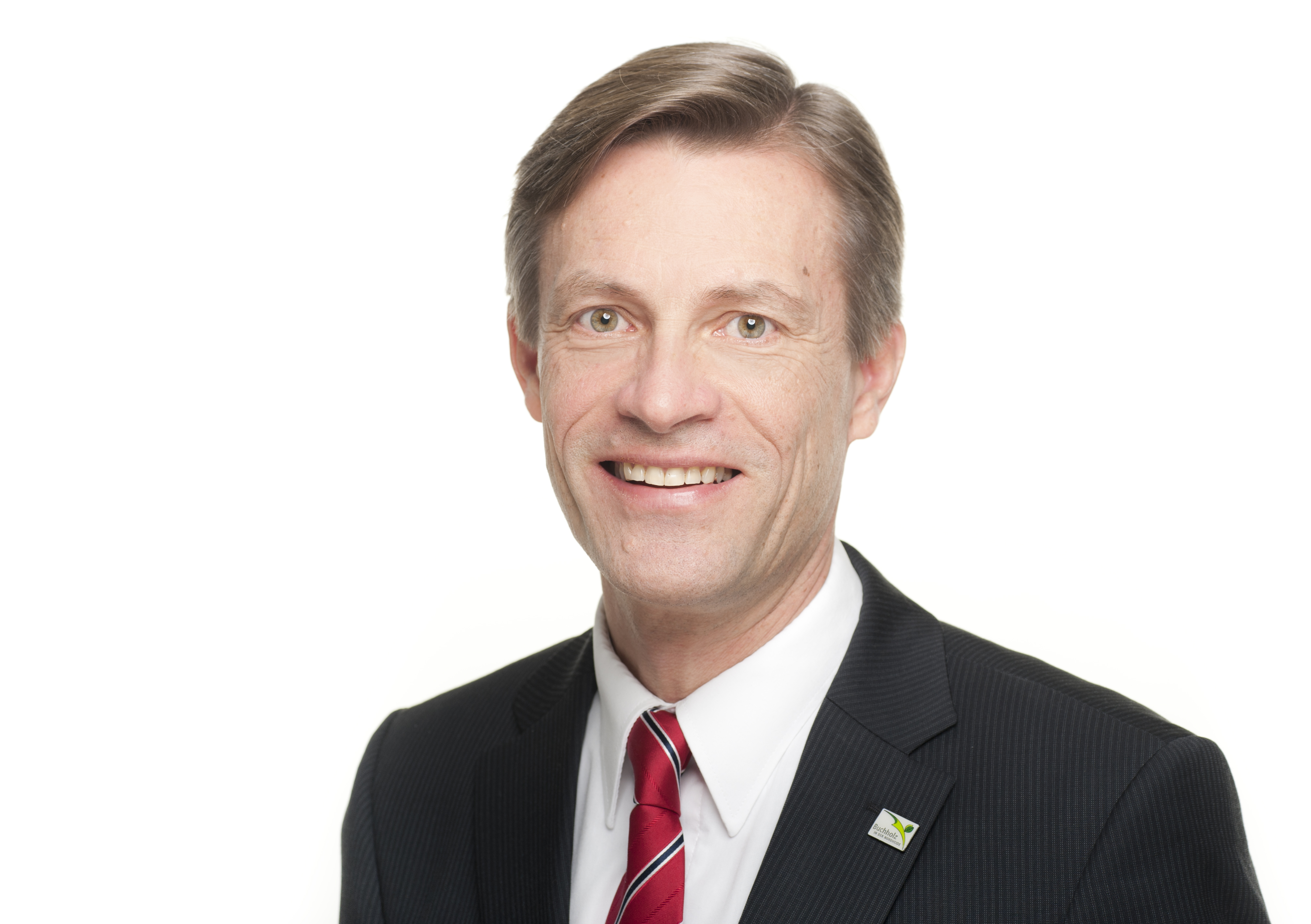 Shooting mit Jan- Hendrik Röhse für den Wahlkampf zur Bürgermeisterwahl in Buchholz im Mai 2014